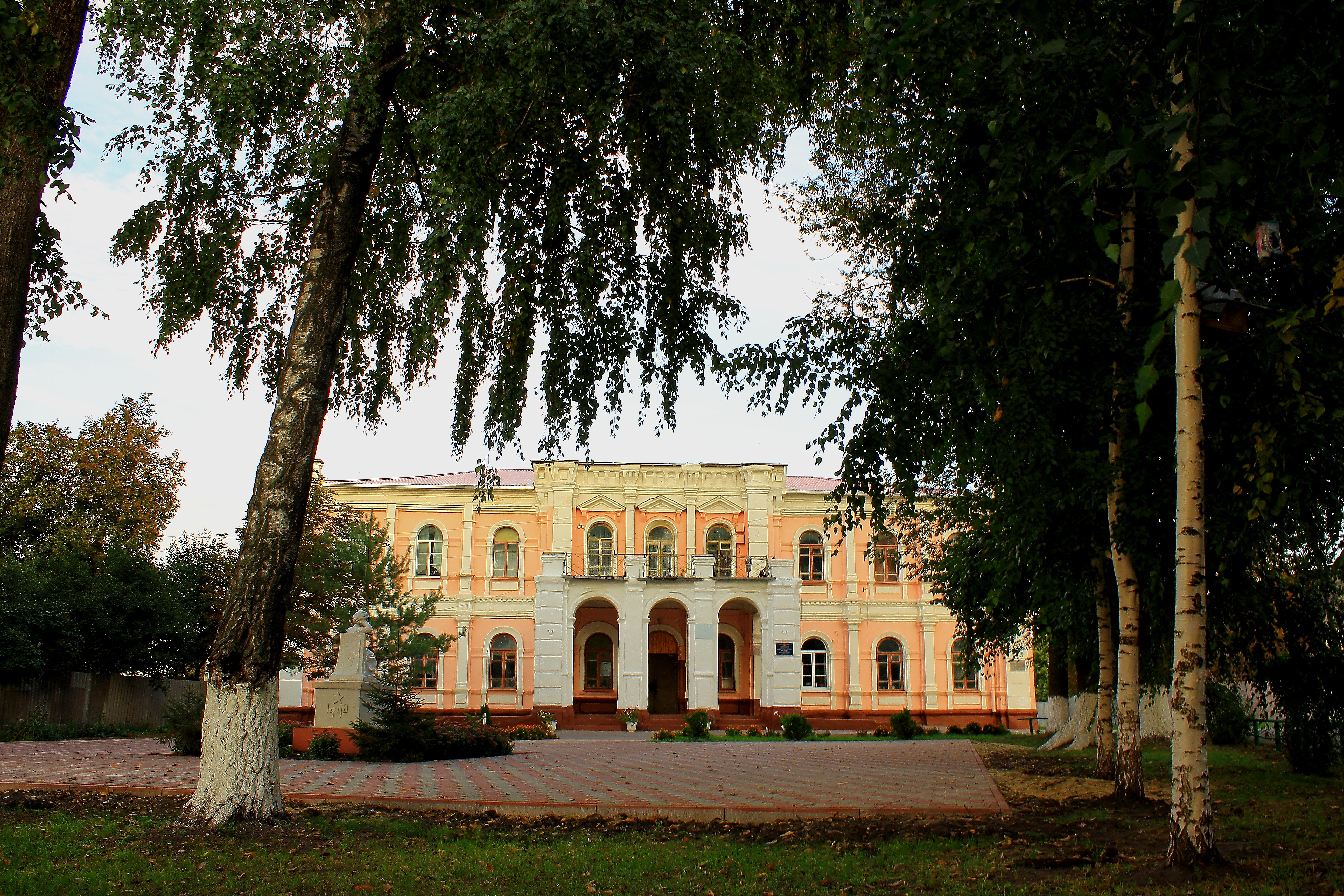 Усадьба Волковой (Белгородская область, Белгород, Корочанская улица, 318)